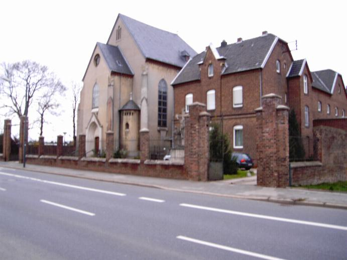 Karmel in Düren own work, papa1234 2006-11-25